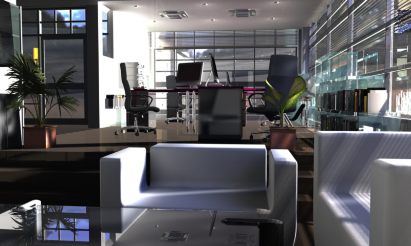 Wizualizacja biura wykonana w programie ArchiCAD 14